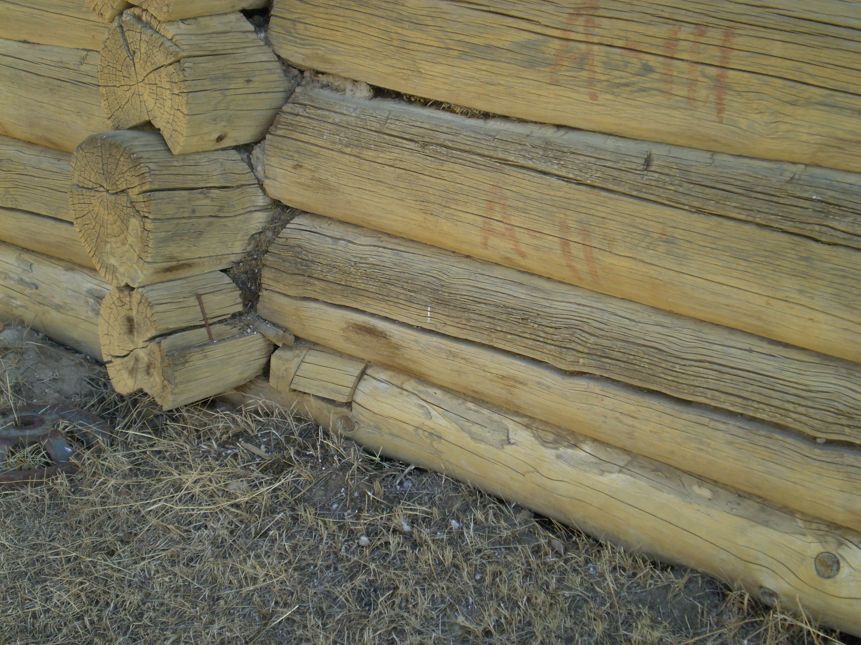 Дом-музей И. К. Калашникова в селе Шаралдай Мухоршибирского района Бурятии. Деталь дома.